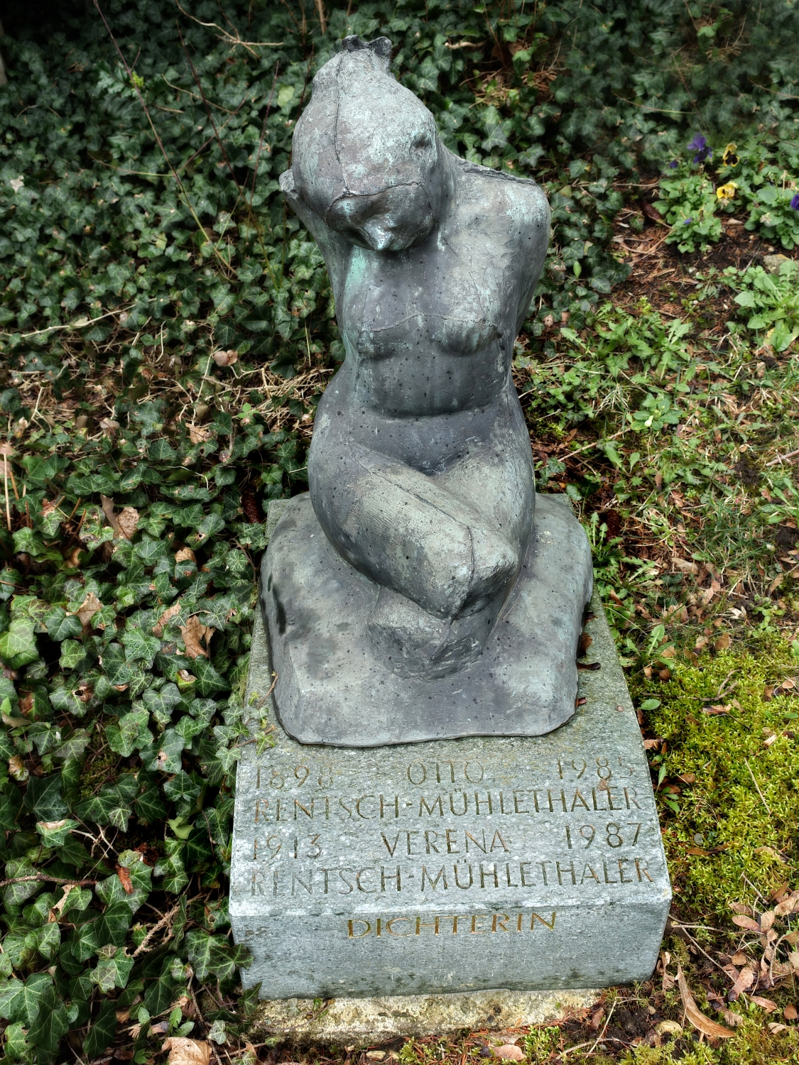 Verena Rentsch-Mühlethaler (1913–1987) Lyrikerin. Ehrengrabfeld auf dem Friedhof Liestal. Grabplastik Melancolia von Jakob Probst (1880–1966)